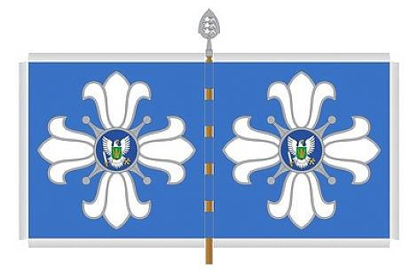 NKK Sakala ringkonna lipp